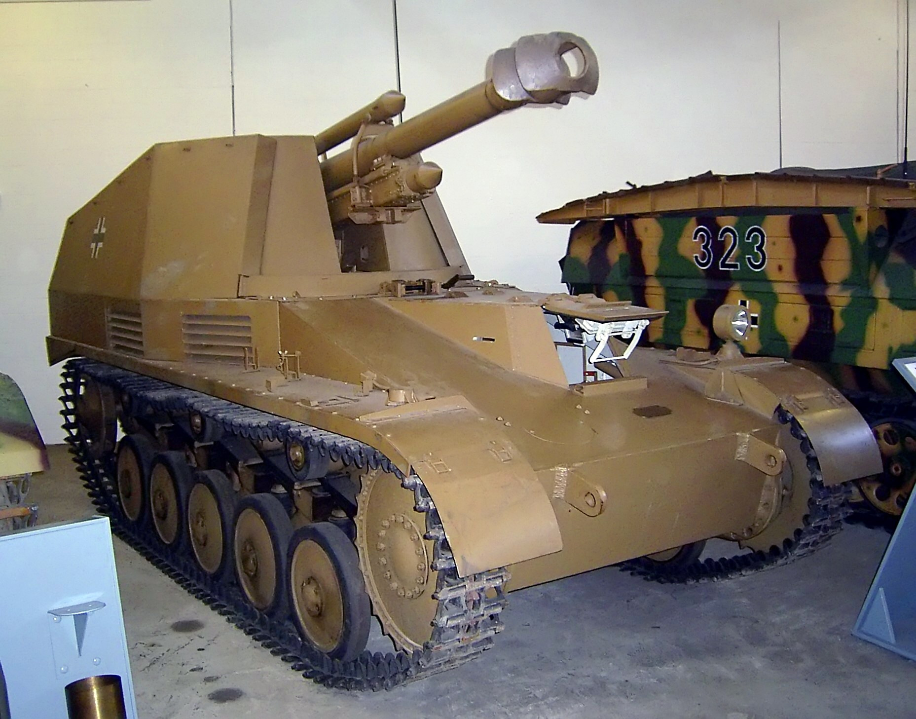 "Wespe" im Deutschen Panzermuseum Munster. Leichte Feldhaubitze 18/2 auf Fahrgestell des Panzer II.